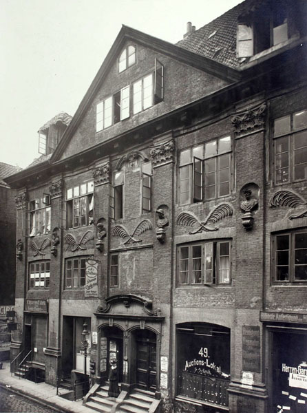 Außenansicht des Gebäudes Düsternstraße 43-51, Fotografie